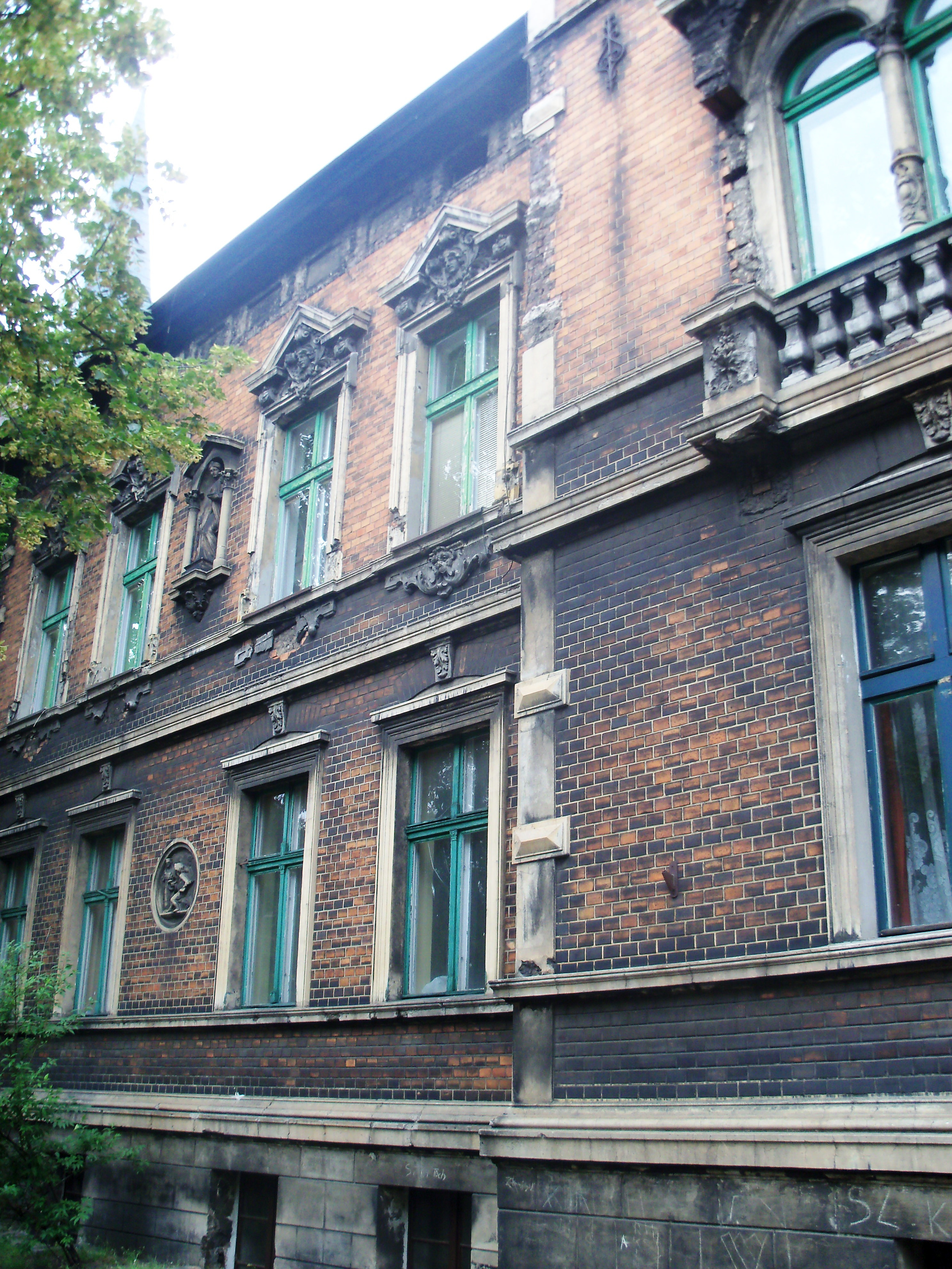 Katowice-Szopienice: ulica ks. bpa Herberta Bednorza - budynek pod numerem 16